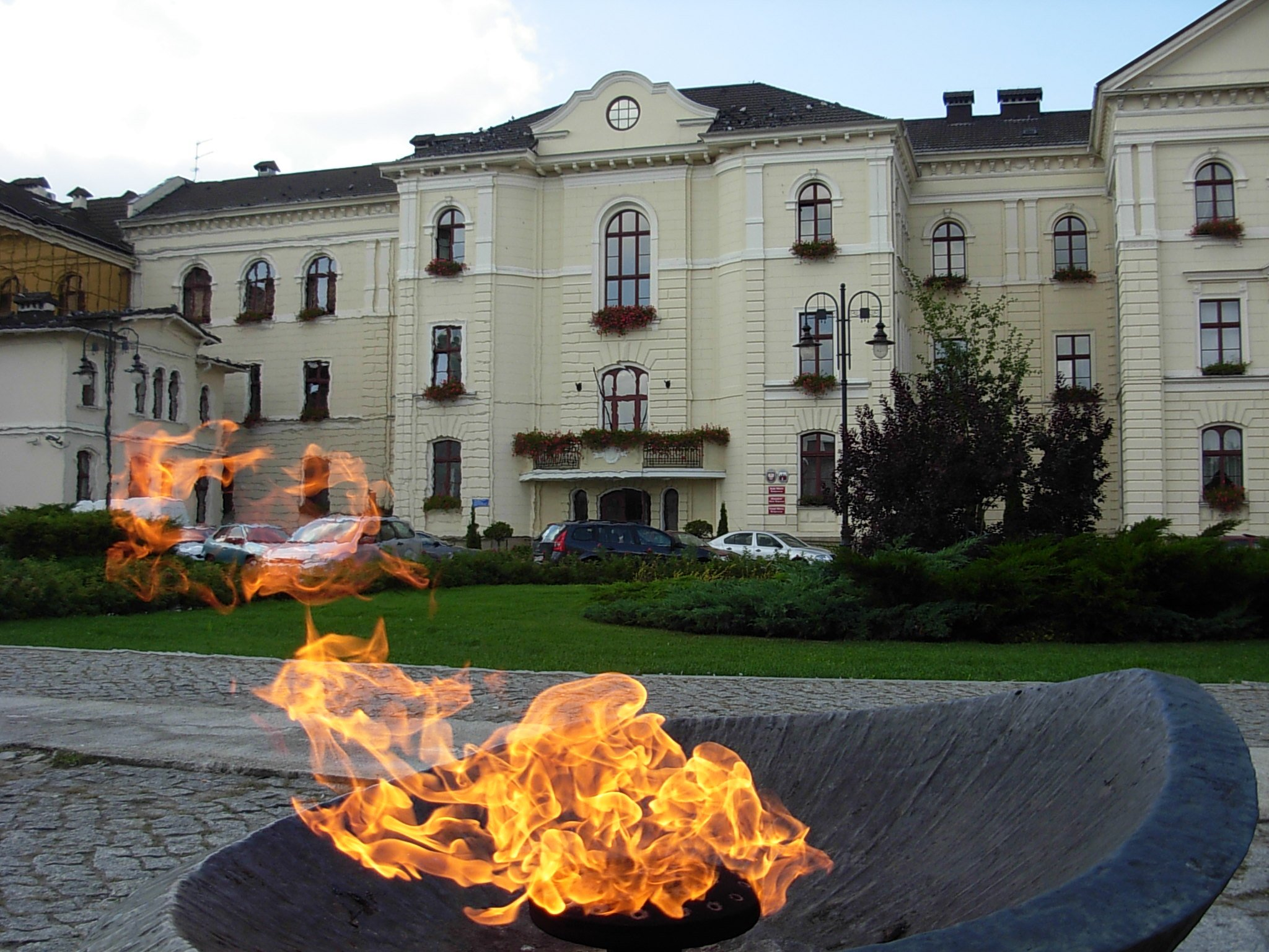 Dawne kolegium jezuickie - obecny ratusz w Bydgoszczy